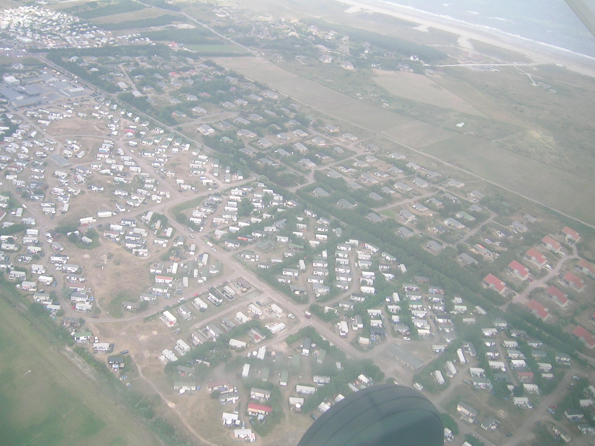 Campingsplatz bei Buren